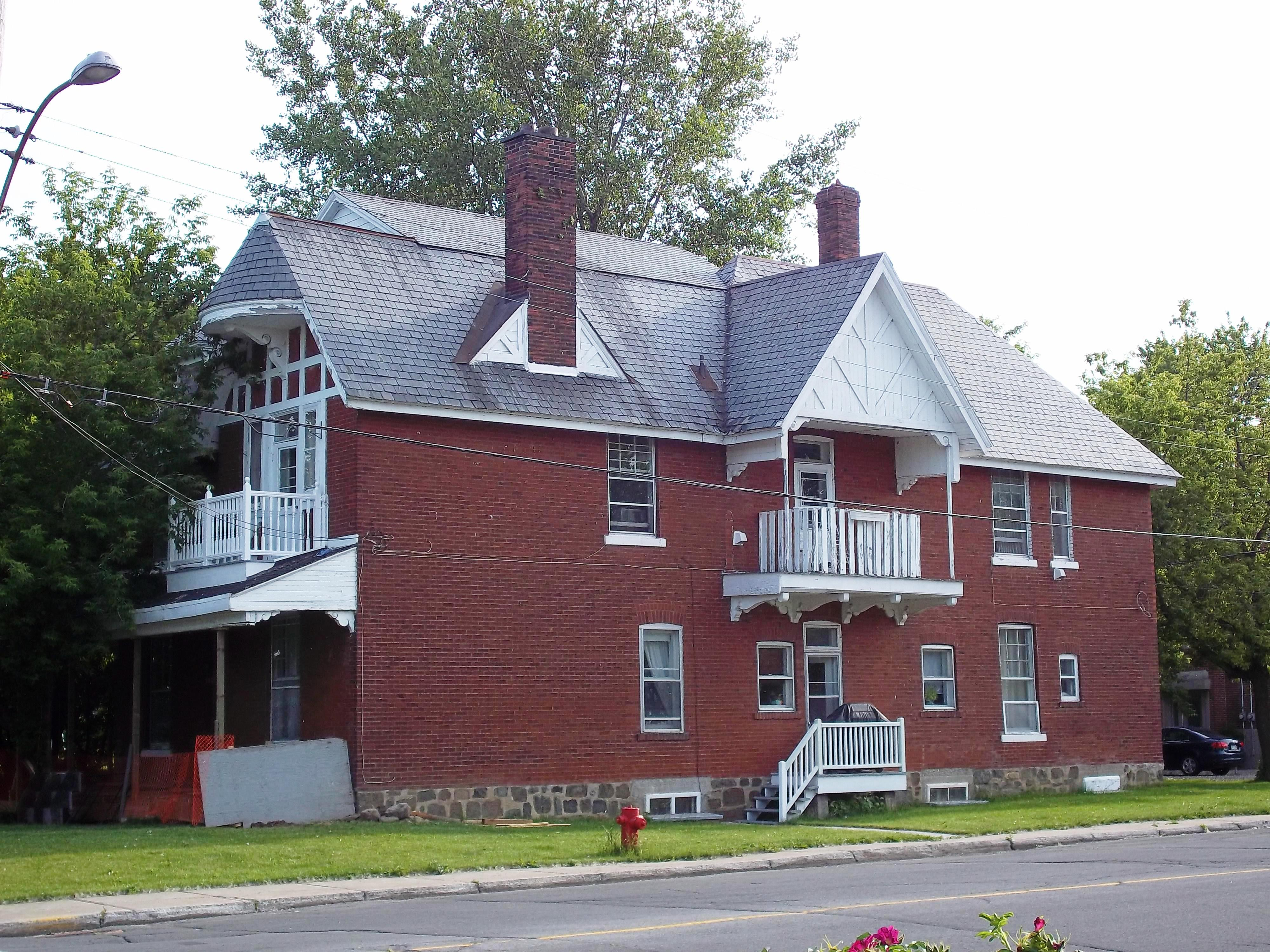 Maison Penniston 7525, boulevard LaSalle, LaSalle, Montréal Grand répertoire du patrimoine bâti de Montréal